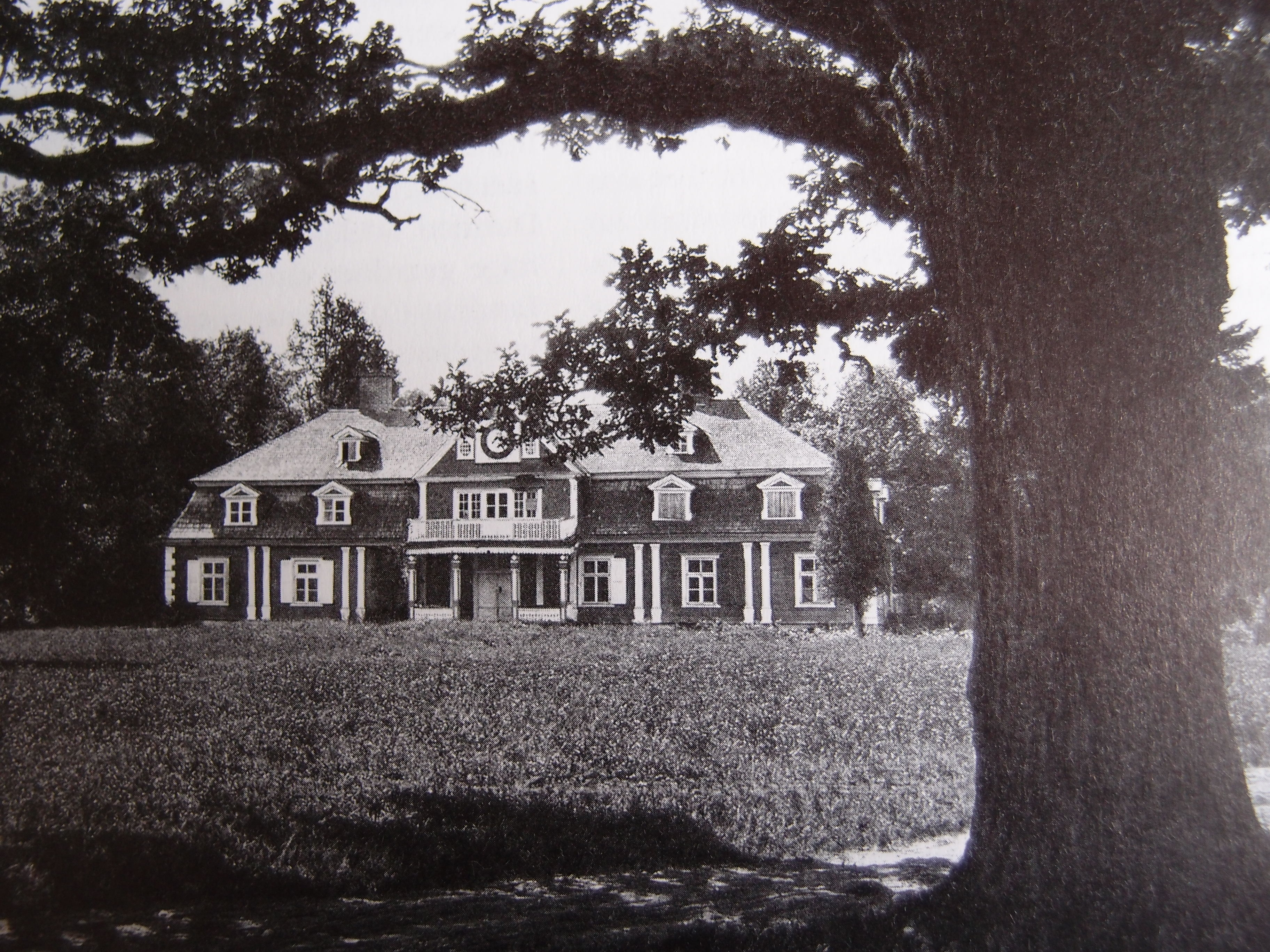 Gutshaus Orellen in Livland (heute: Ungurmuiža, Bezirk Pārgauja, Lettland) Datum: Anfang 20. Jahrhundert Urheber: unbekannt Quelle: "Gutshof unter den Eichen", Katalog der Ausstellung im Schlossmuseum Rundale und im Herder-Institut Marburg, 1998